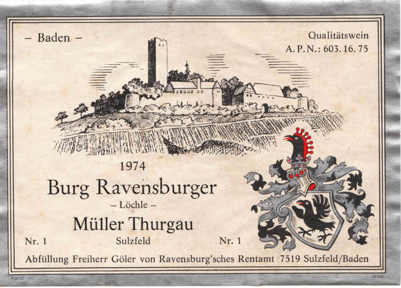 altes Etikett des 1974er Jahrgangs